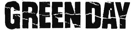 Green Day en Warning